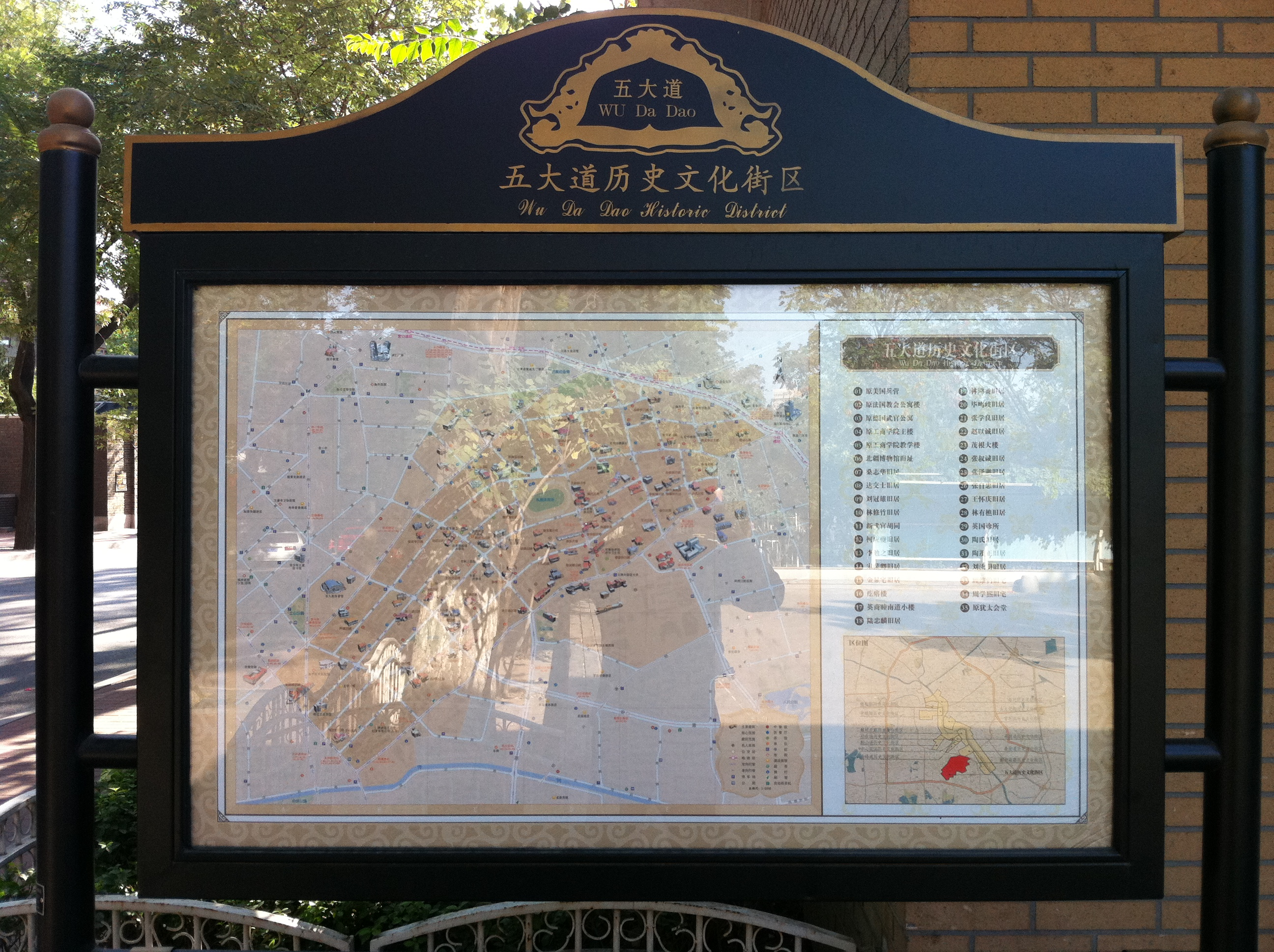 五大道历史文化街区地图